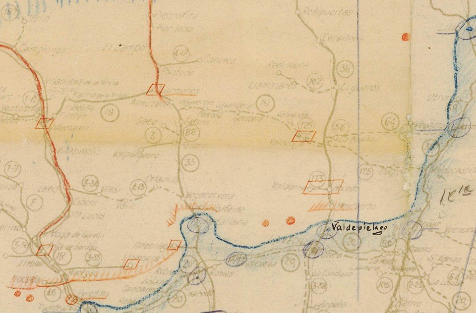 Mapa donde aparecen representados los frentes de la Guerra Civil Española en la montaña de los Argüellos y sus pueblos